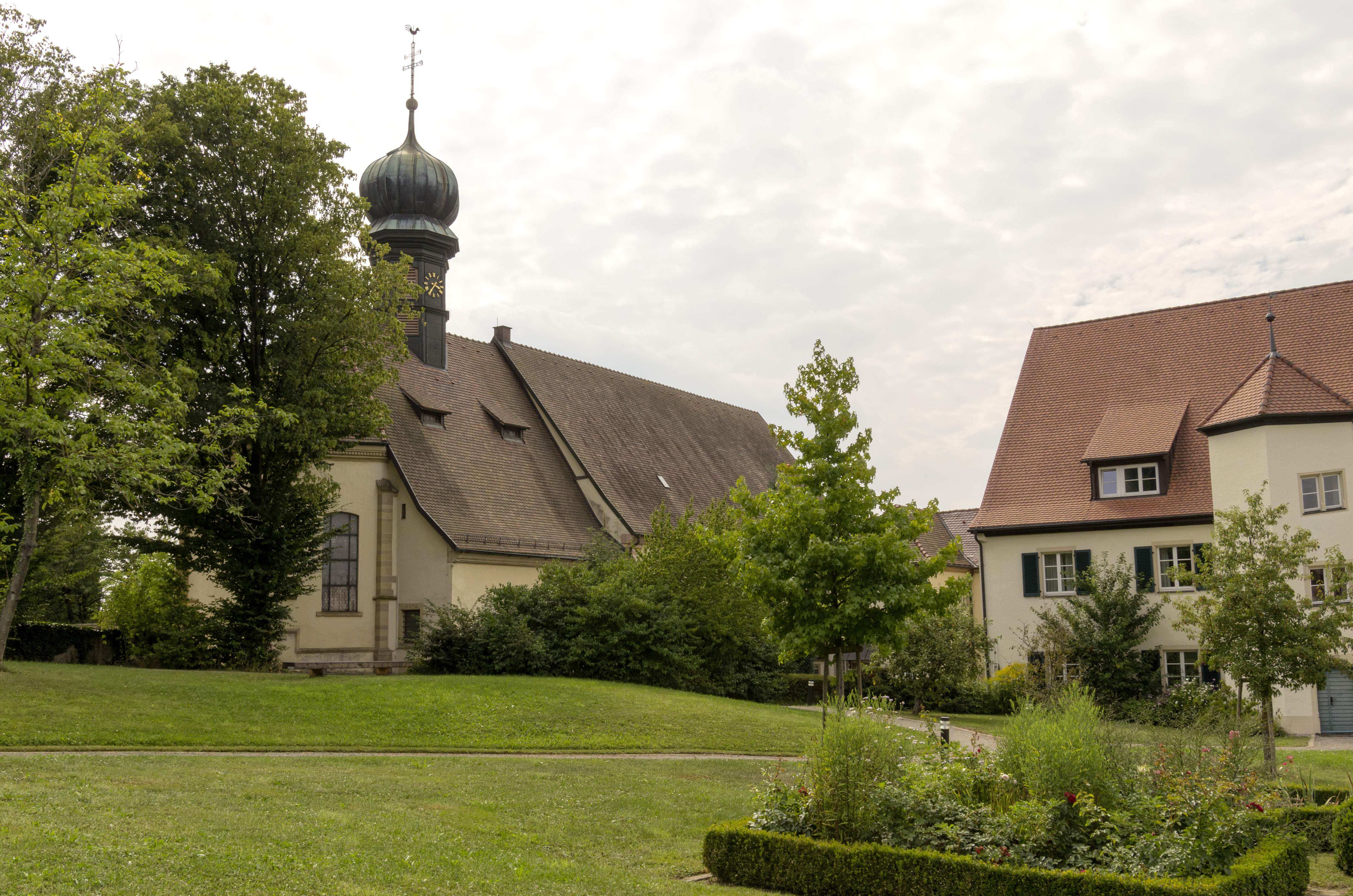 Katholische Pfarrkirche in Sölden bei Freiburg